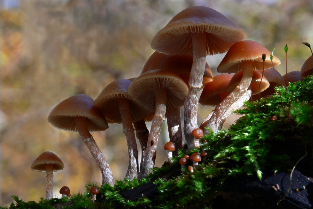 Gifthäublinge (Galerina marginata)